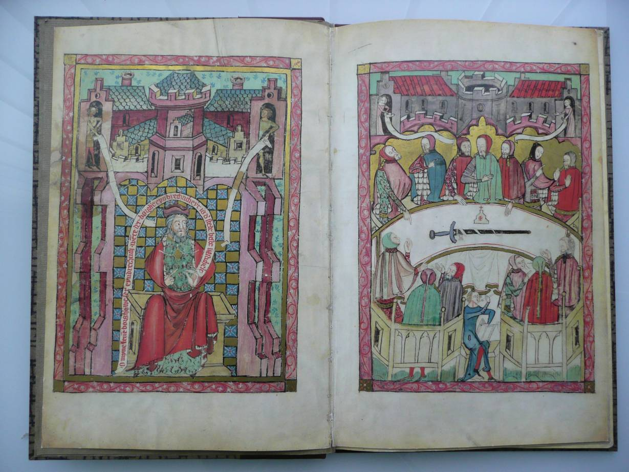 Rechtsbuch der Stadt Herford, wertvollste Archivale des Herforder Stadtarchivs